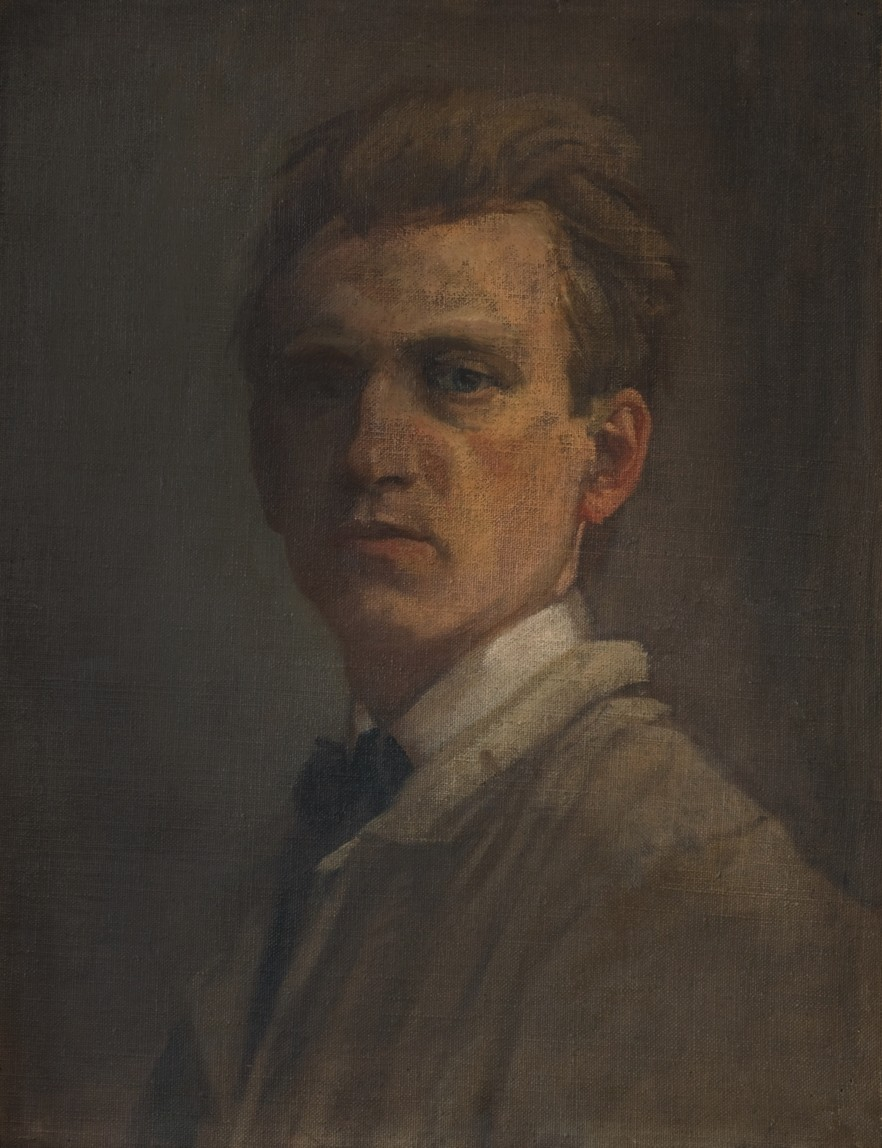 MAYER-ZAJÍC Daniel - Autoportrét (1900), se sbírek Severočeské galerie výtvarného umění v Litoměřicích